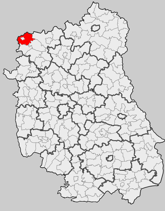 Map of gmina Stoczek Łukowski (rural), Łuków county, Lublin voivodship Mapa gminy Stoczek Łukowski (wiejska), powiat łukowski, województwo lubelskie